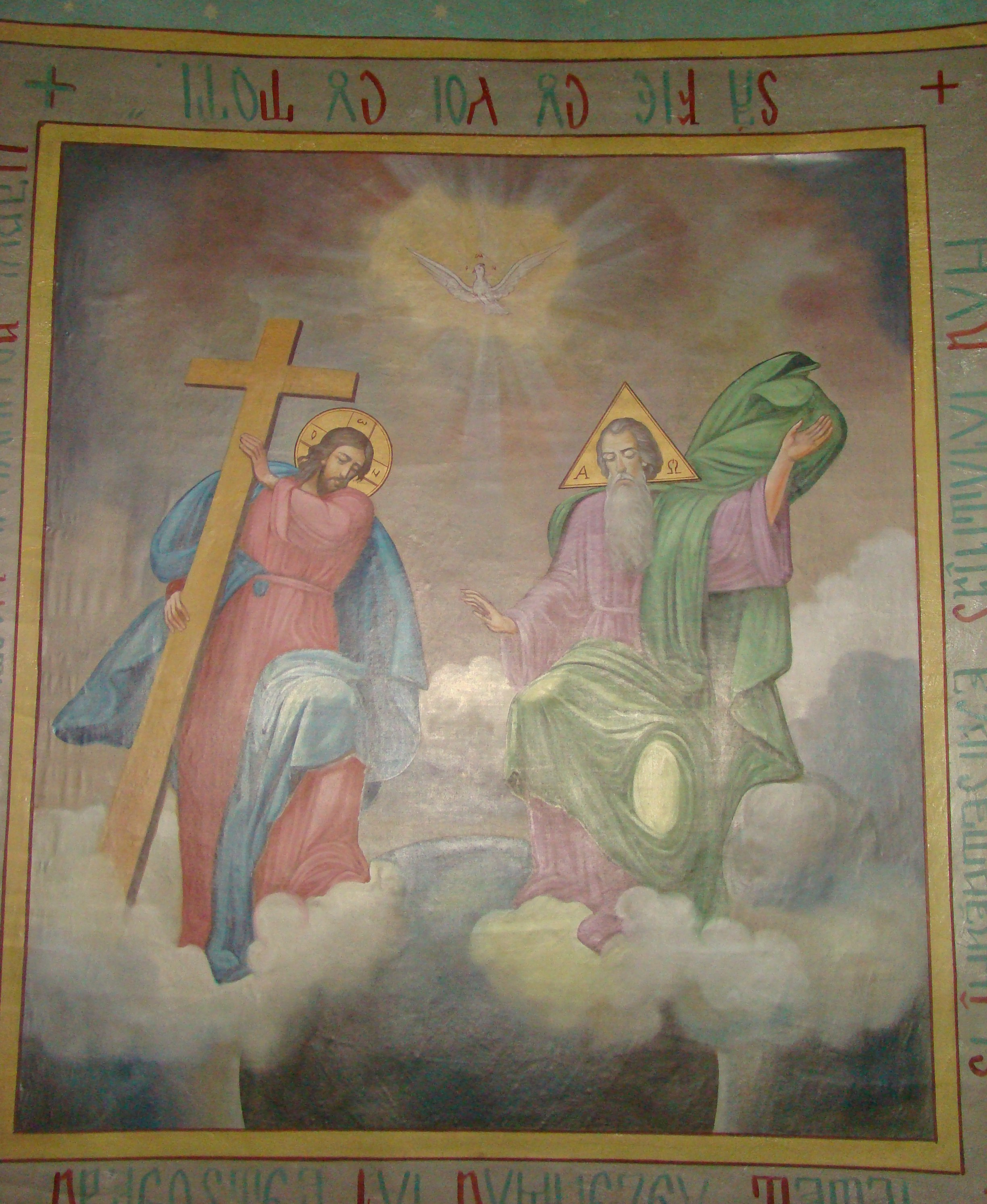 Răchițele, județul Cluj